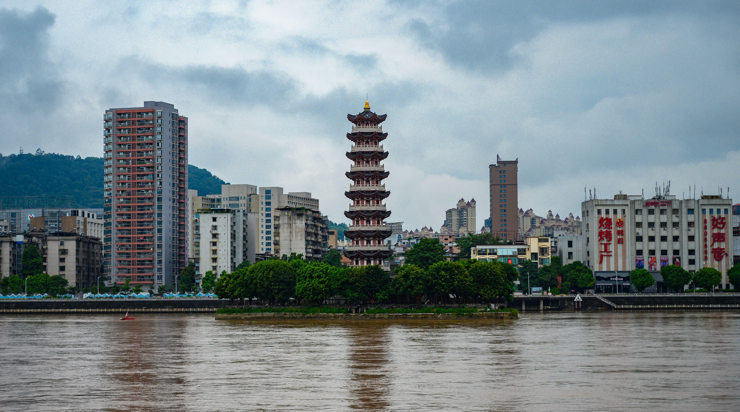 39192-Danxiashan